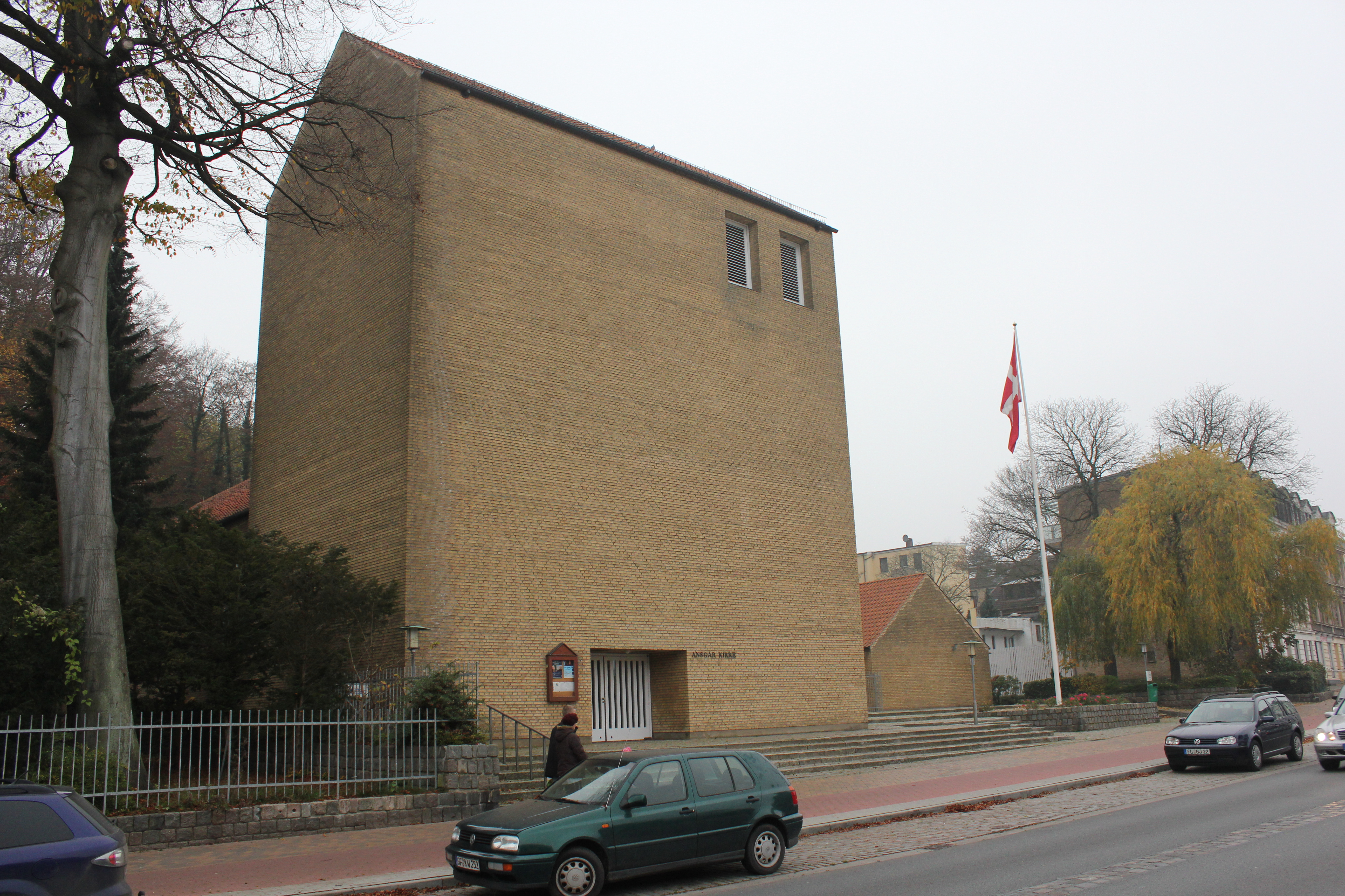 Ansgar Kirche, Ansgar Kirke, Flensburg, Flensborg, Apenrader StraßeDansk: Ansgar Kirke, Flensborg